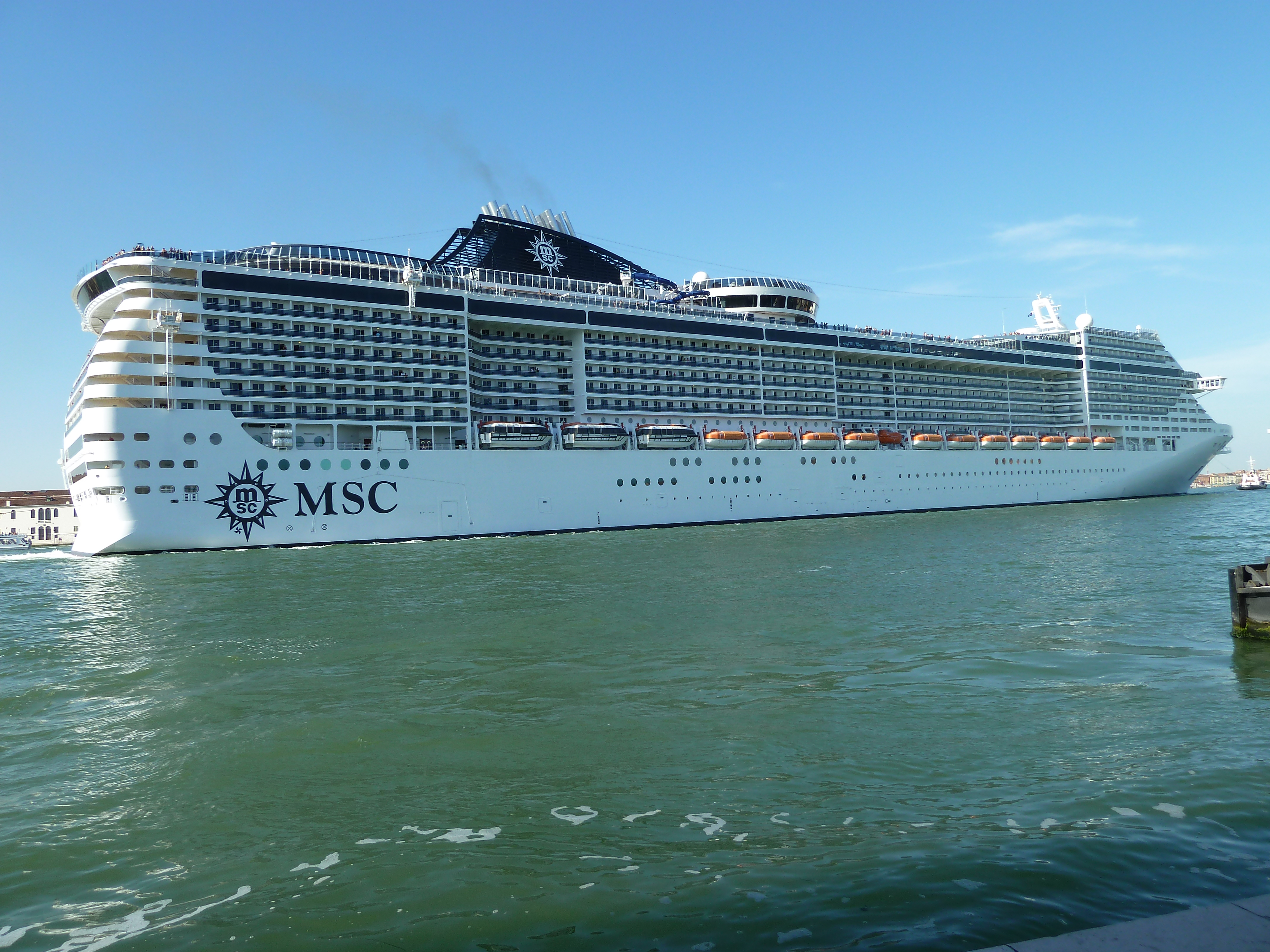 MSC Divina